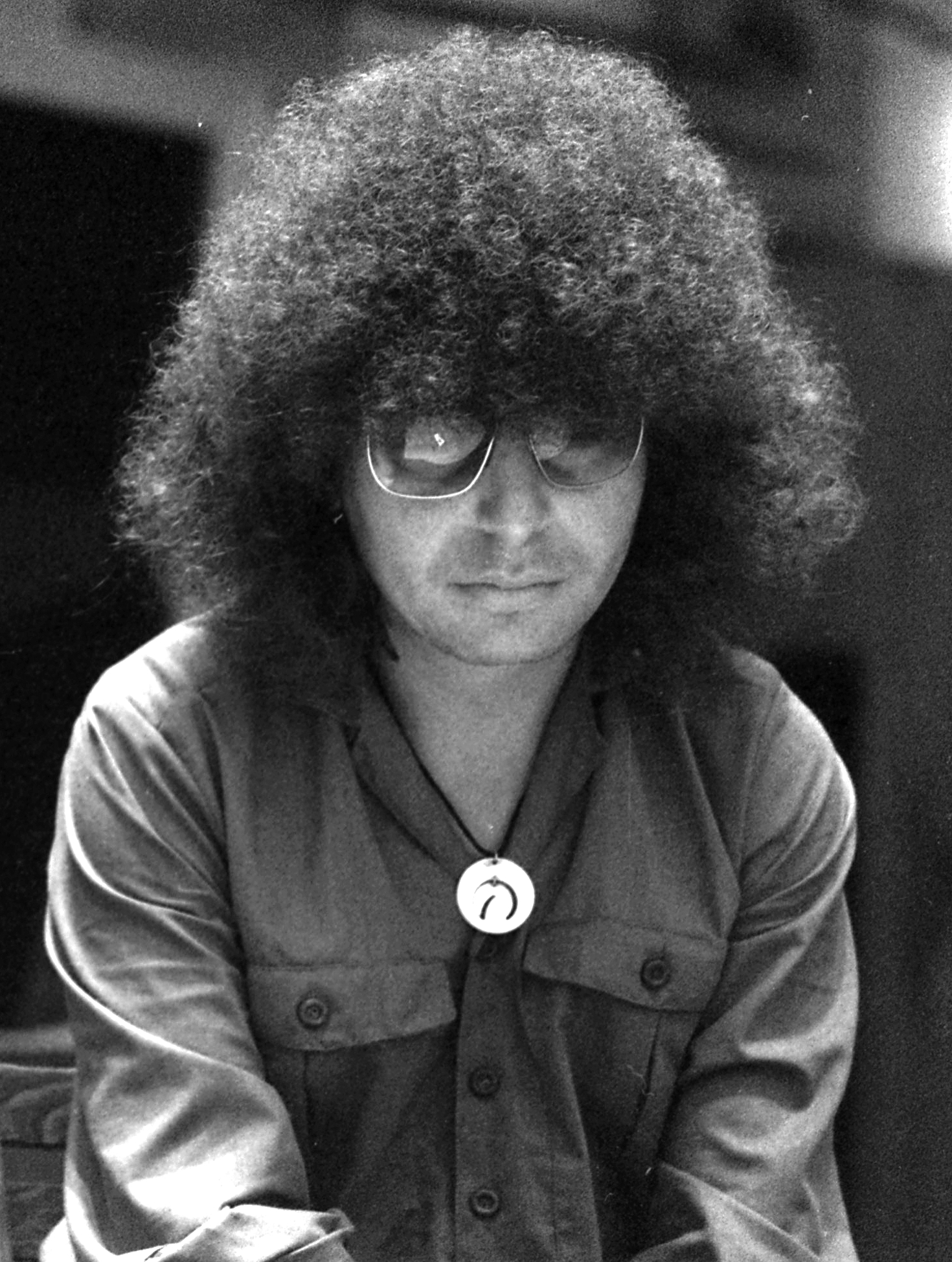 Demjén Ferenc magyar énekes.